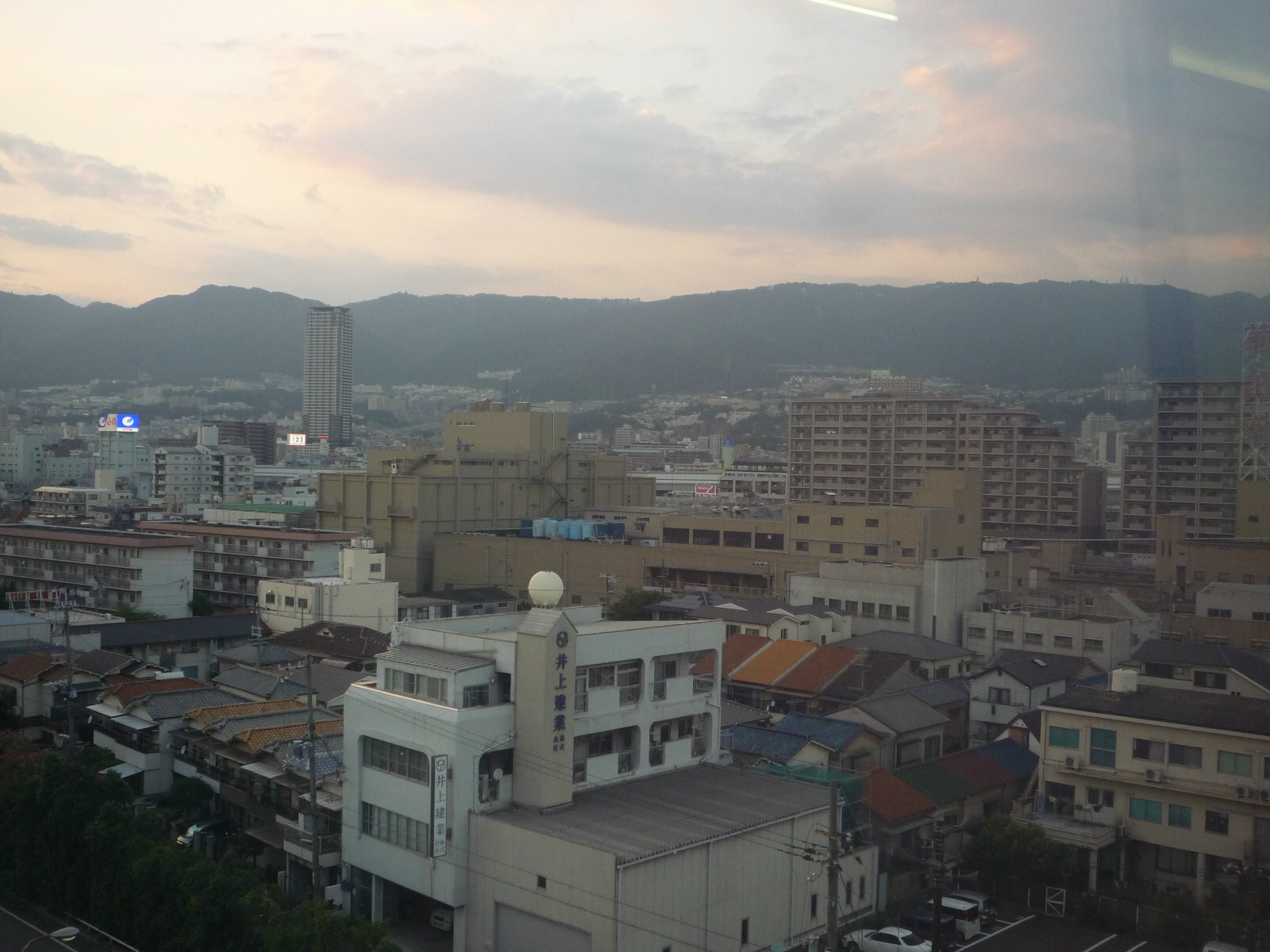 Minamiuozaki